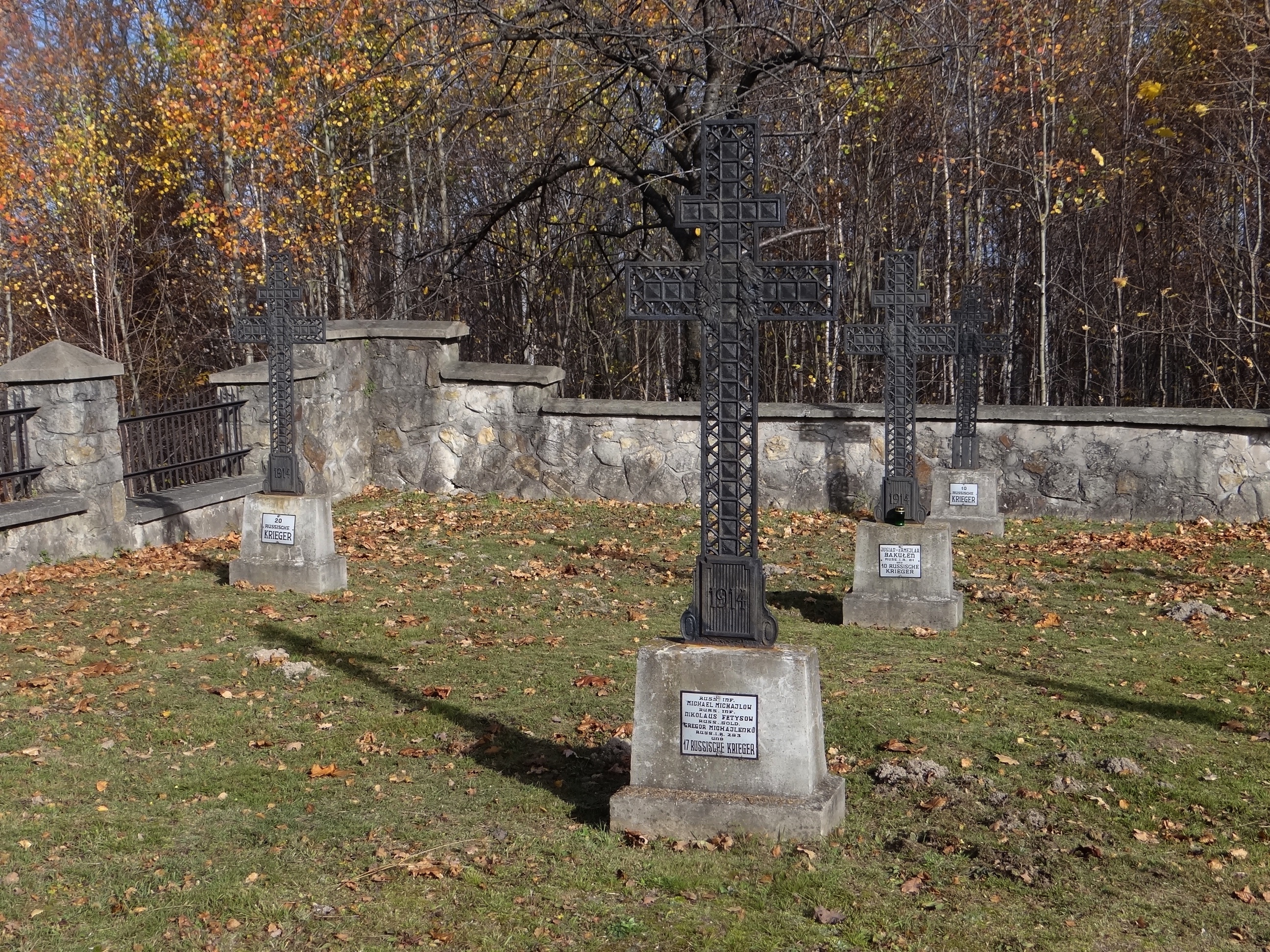 Cmentarz wojenny nr 341 Sobolów-Zonia